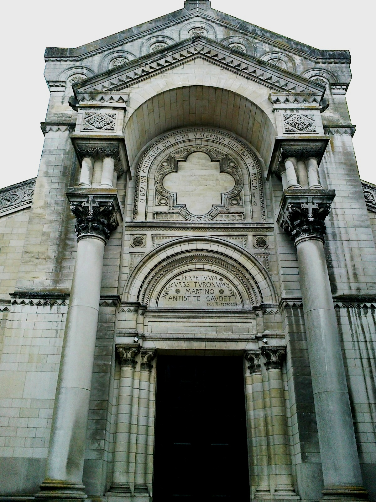 Indre-Et-Loire Tours Basilique Saint-Martin Portail Sud 18052012